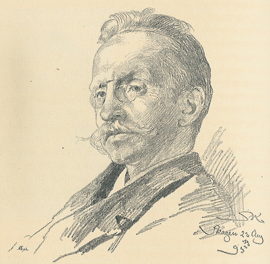 Otto Benzon